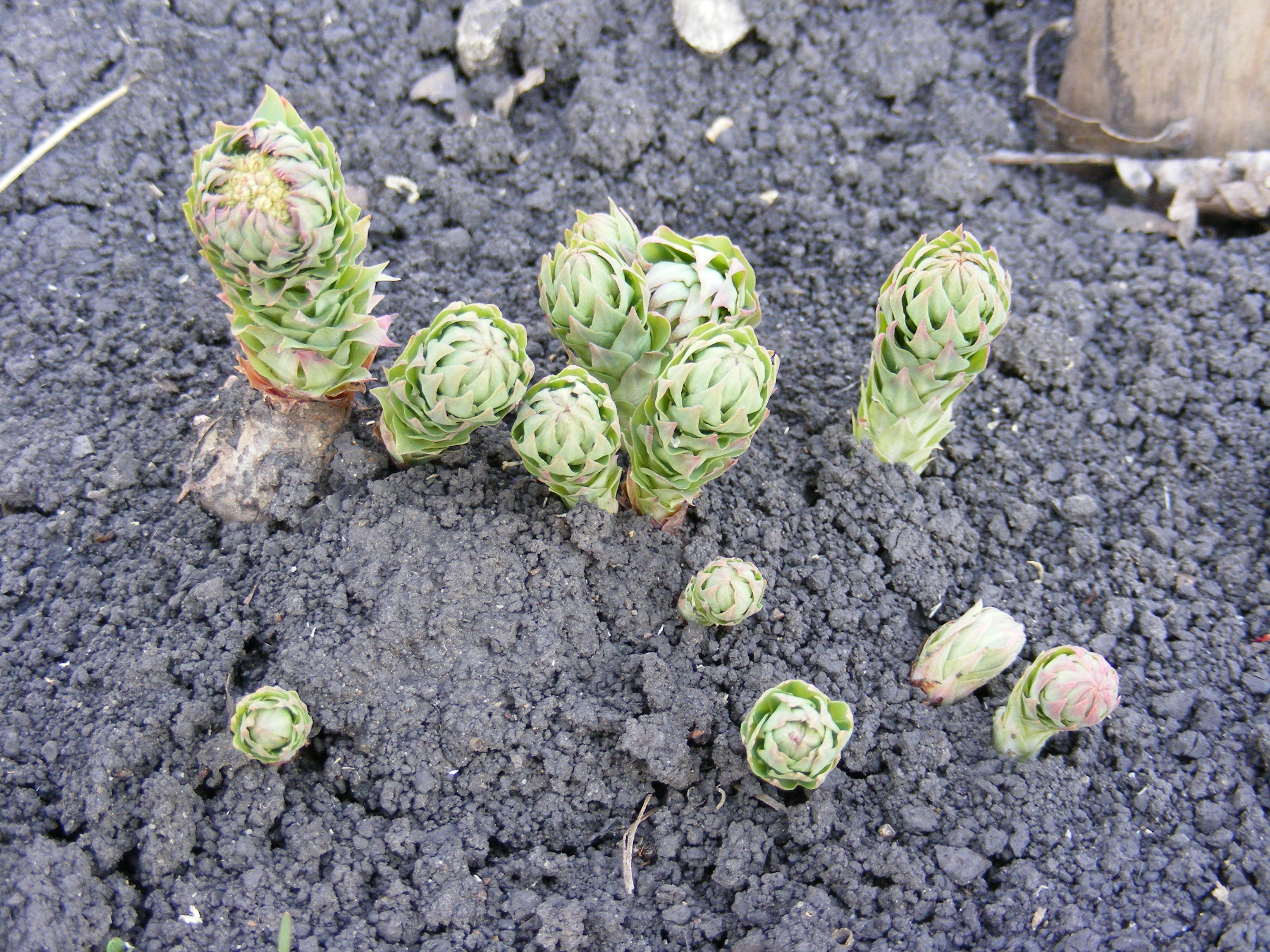 Родиола розовая (Rhodiola rosea L.). Молодые ростки рано весной.